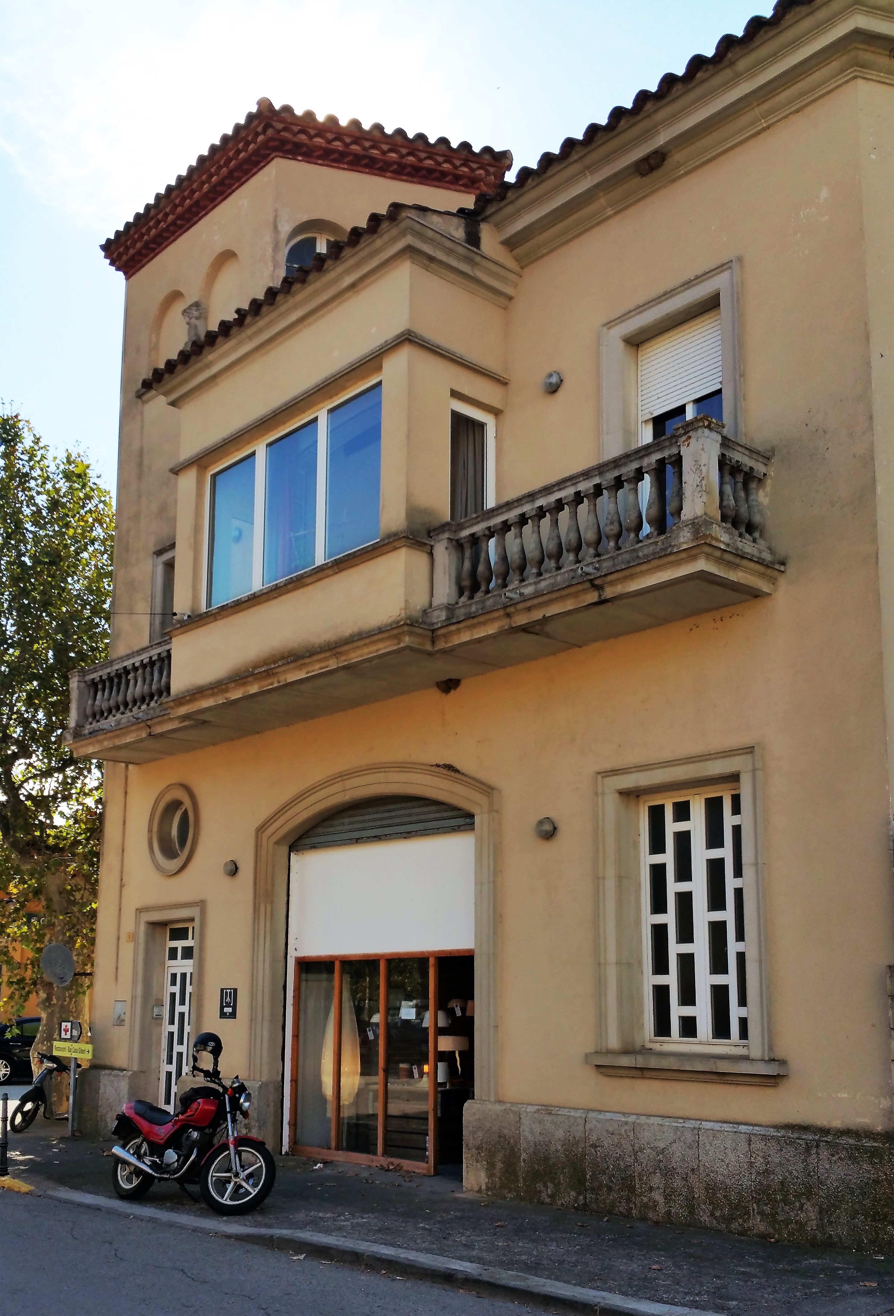 Casa al carrer Josep Ribot, 1 (Saus, Camallera i Llampaies)